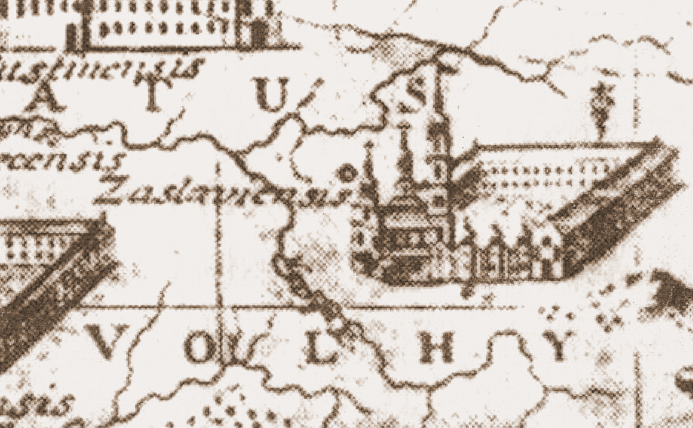 Фрагмент мапи "Tabula chorographica Provinciae Russiae", 1753-1783.